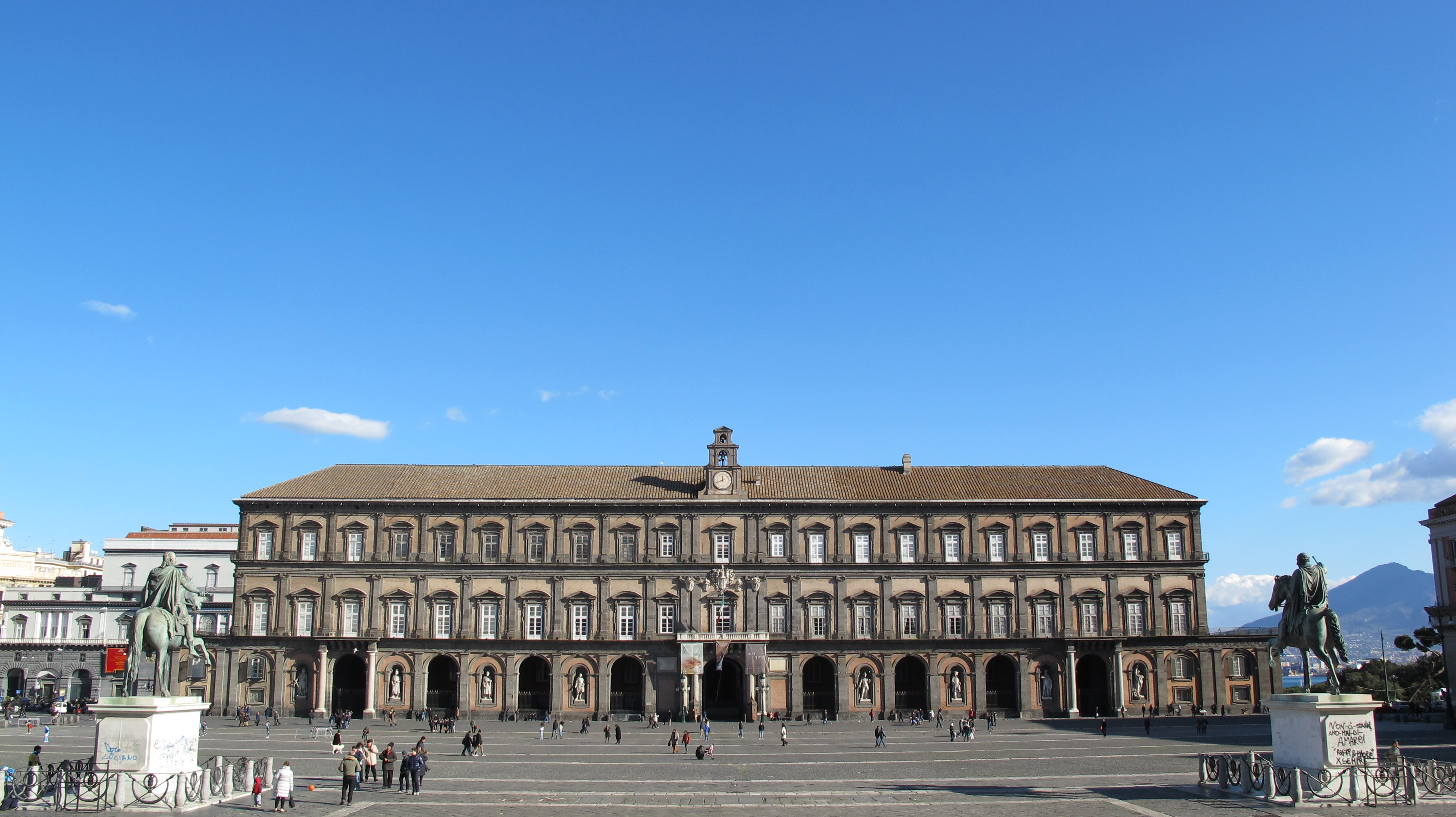 Palazzo reale, Napoli